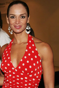 Lupita Serpent Jones, directora de Nuestra Belleza México y Miss Universo 1991